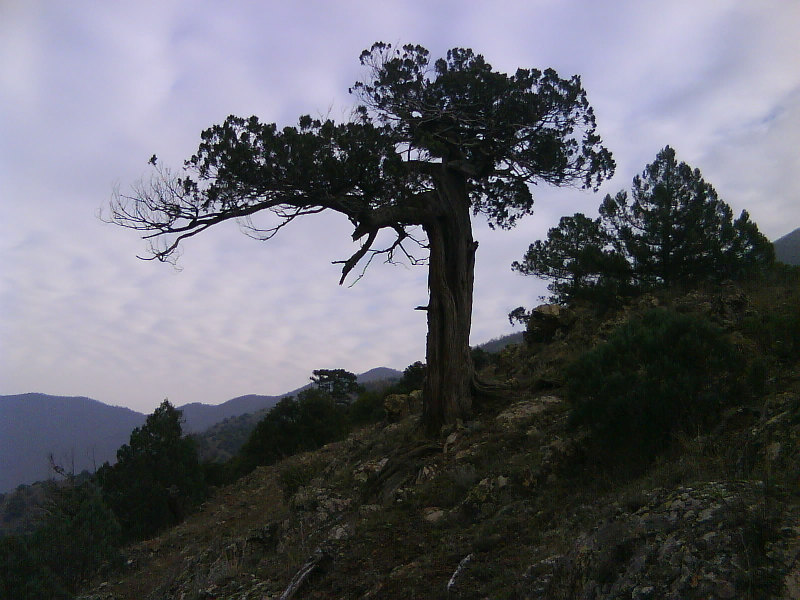 Mesnosta Karadak na Gradečka Planina